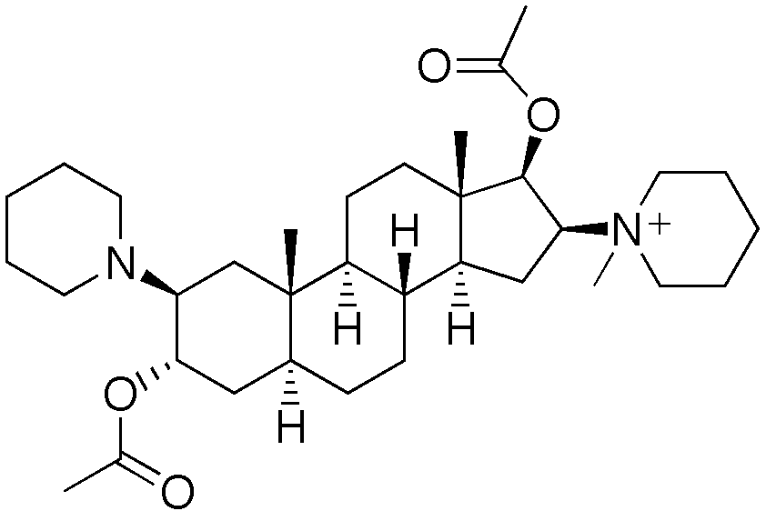 chemical structure of vecuronium